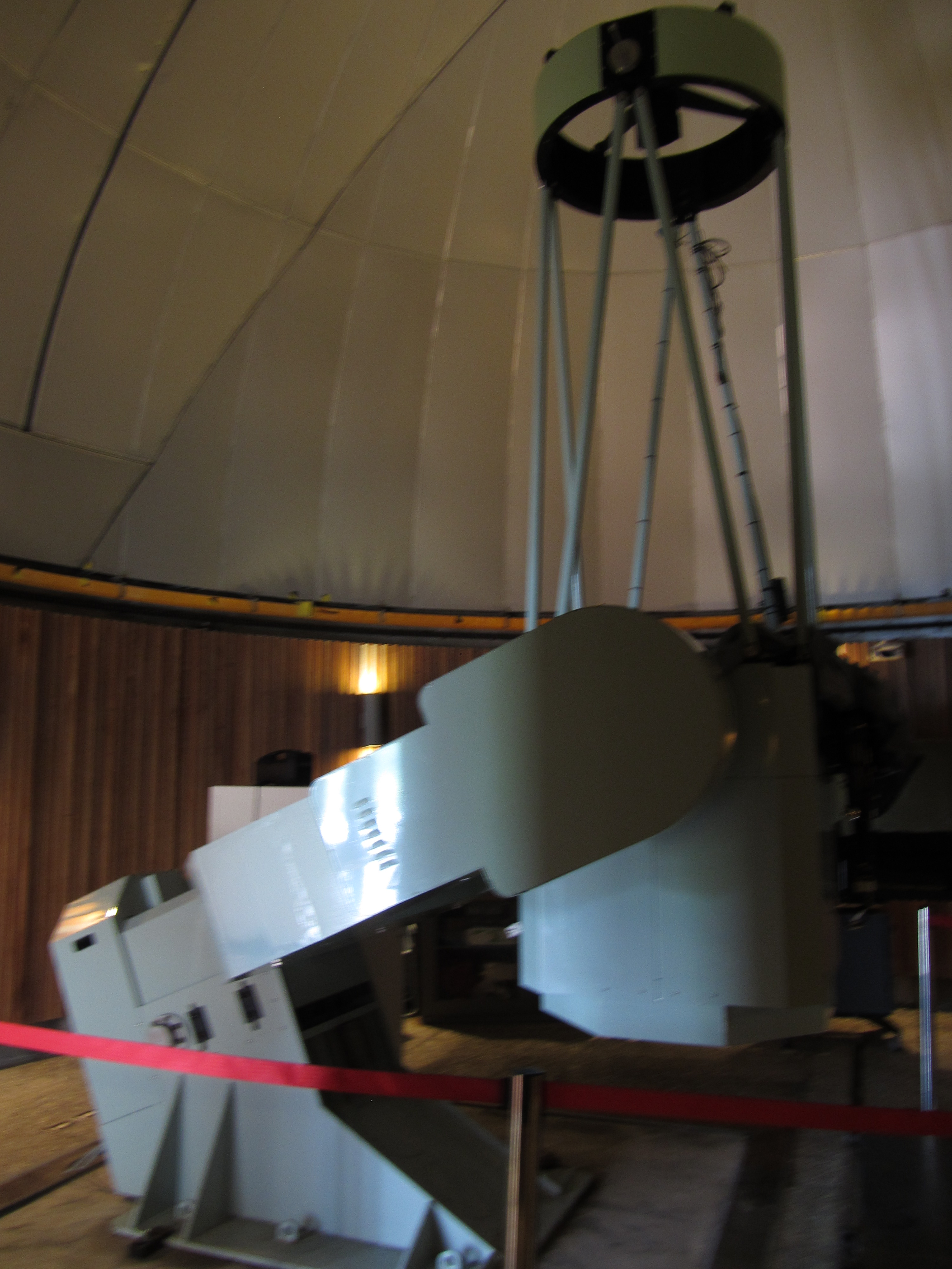 南瀛天文教育園區口徑76公分牛頓式反射望遠鏡。